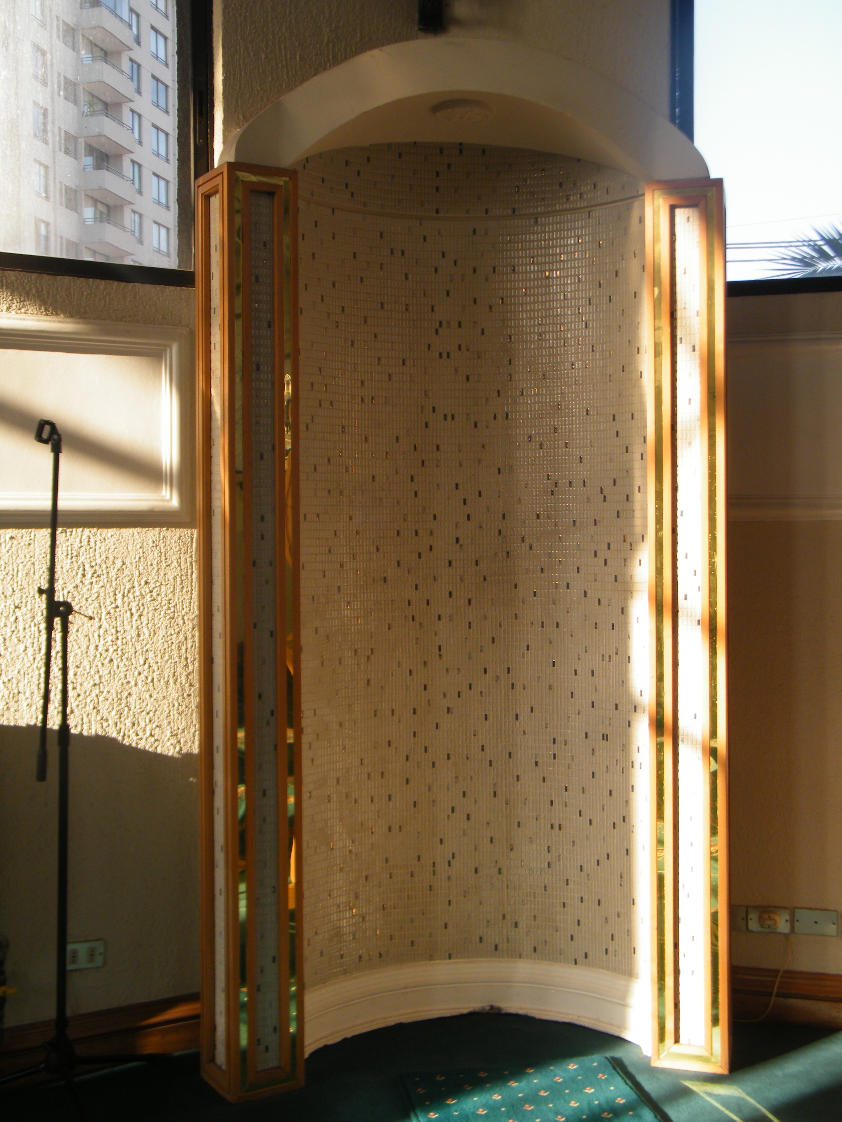 Qibla Mihrab Mezquita As-Salam